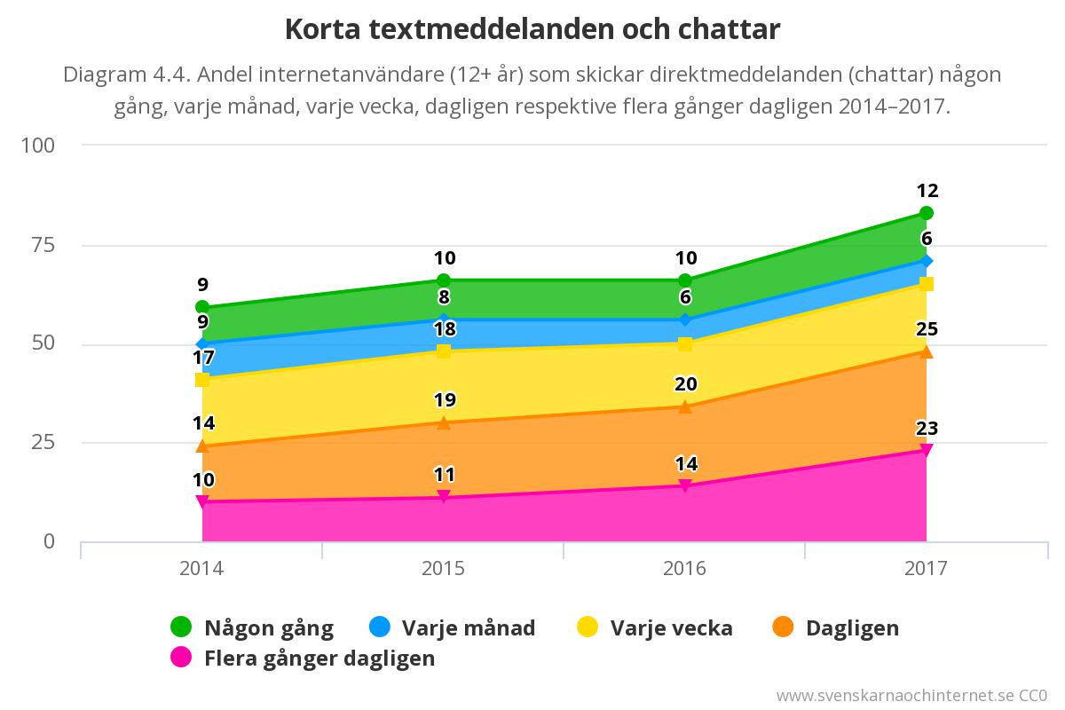 Andel svenska internetanvändare (+12 år) som skickar direktmeddelanden (chattar) någon gång, varje månad, varje vecka, dagligen respektive flera gånger dagligen 2014–2017. Siffror från undersökningen "Svenskarna och internet 2017".